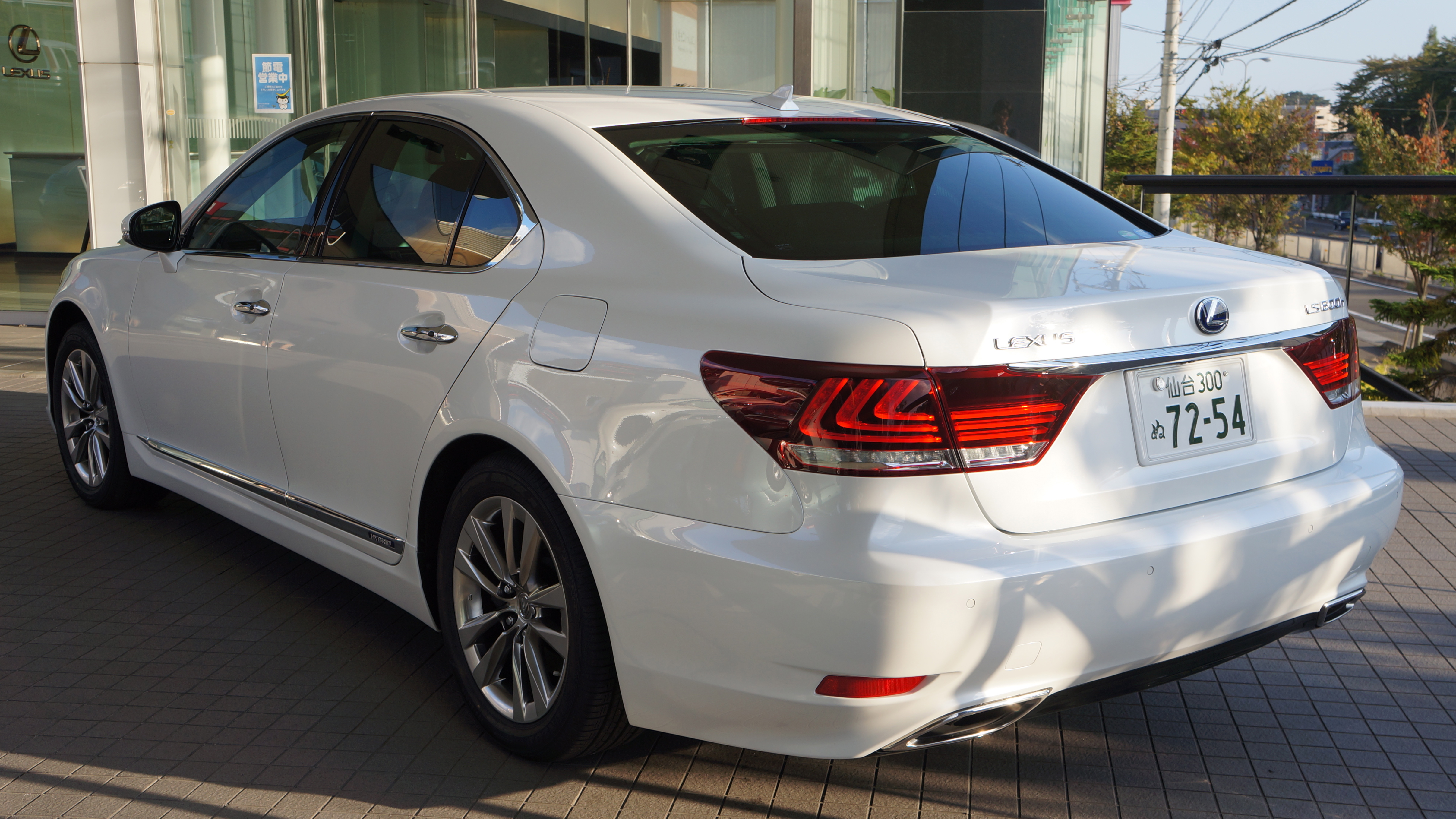 レクサス LS600h 2012年モデル日本仕様車 リア